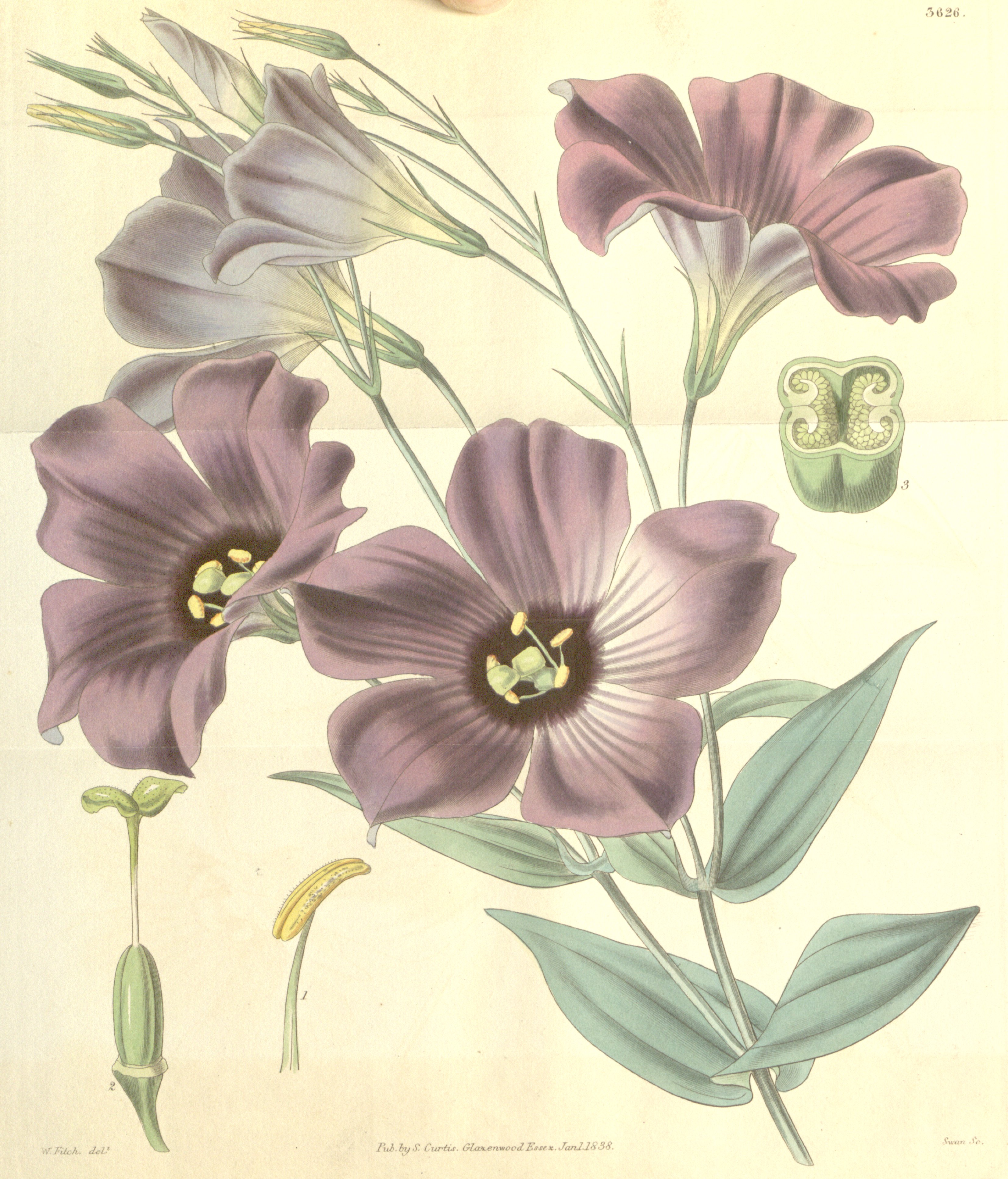 Eustoma exaltatum subsp. russellianum